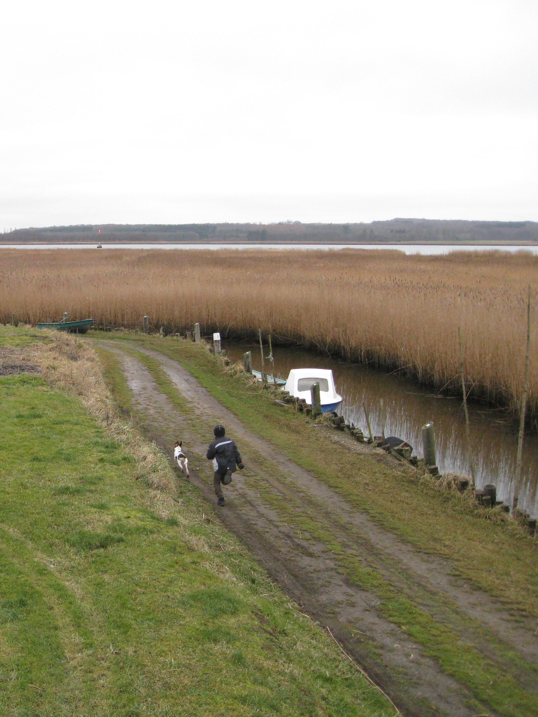 Randers Fjord sivskov